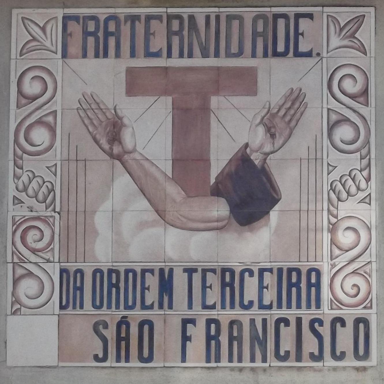 Ordem Franciscana Secular do Brasil : Fraternidade São Francisco(?) : Igreja Sagrado Coração de Jesus, Petrópolis, estado do Rio de Janeiro, Brasil